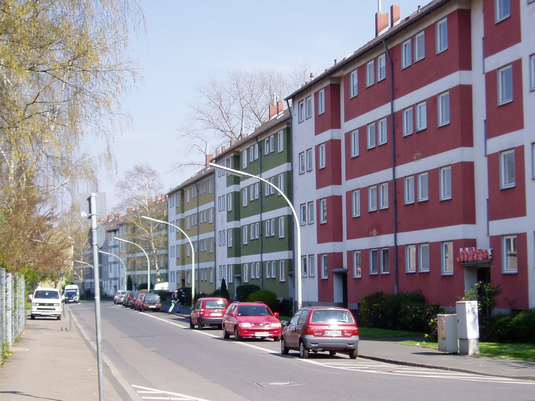 Sanierungsgebiet Köln-Vingst